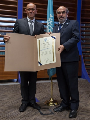 Entrega del reconocimiento